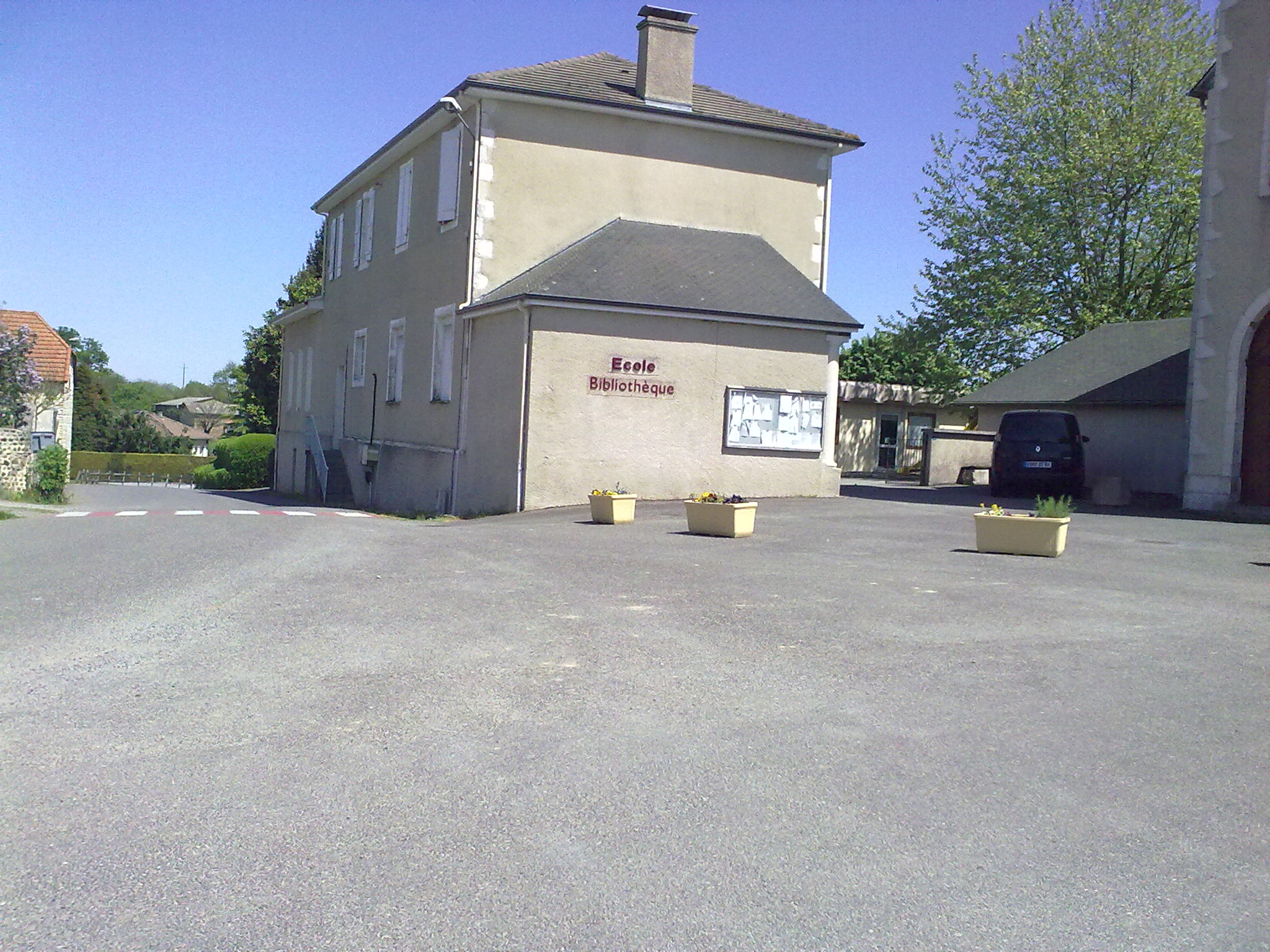 Ouillon, France